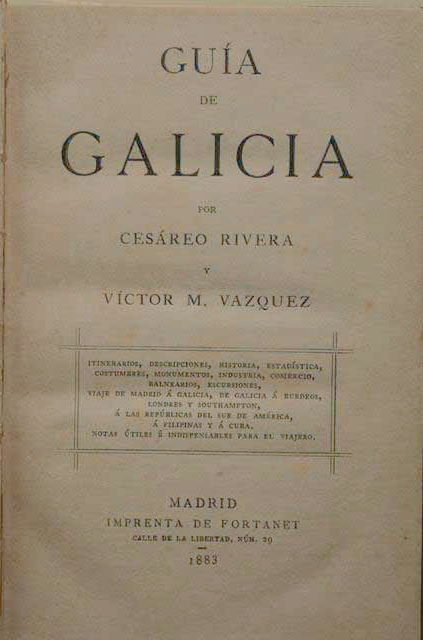 Portada da obra Guía de Galicia de Cesáreo Rivera Abraldes e Víctor María Vázquez Rodríguez, co seguinte texto: GUÍADEGALICIAPORCESÁREO RIVERAYVÍCTOR M. VAZQUEZITINERARIOS, DESCRIPCIONES, HISTORIA, ESTADÍSTICA,COSTUMBRES, MONUMENTOS, INDUSTRIA, COMERCIO,BALNEARIOS, EXCURSIONES,VIAJE DE MADRID Á GALICIA, DE GALICIA Á BURDEOS,LONDRES Y SOUTHHAMPTON,Á LAS REPÚBLICAS DEL SUR DE AMÉRICA,Á FILIPINAS Y Á CUBA.NOTAS ÚTILES É INDISPENSABLES PARA EL VIAJERO.MADRIDIMPRENTA DE FORTANETCALLE DE LA LIBERTAD, NÚM. 30-1883